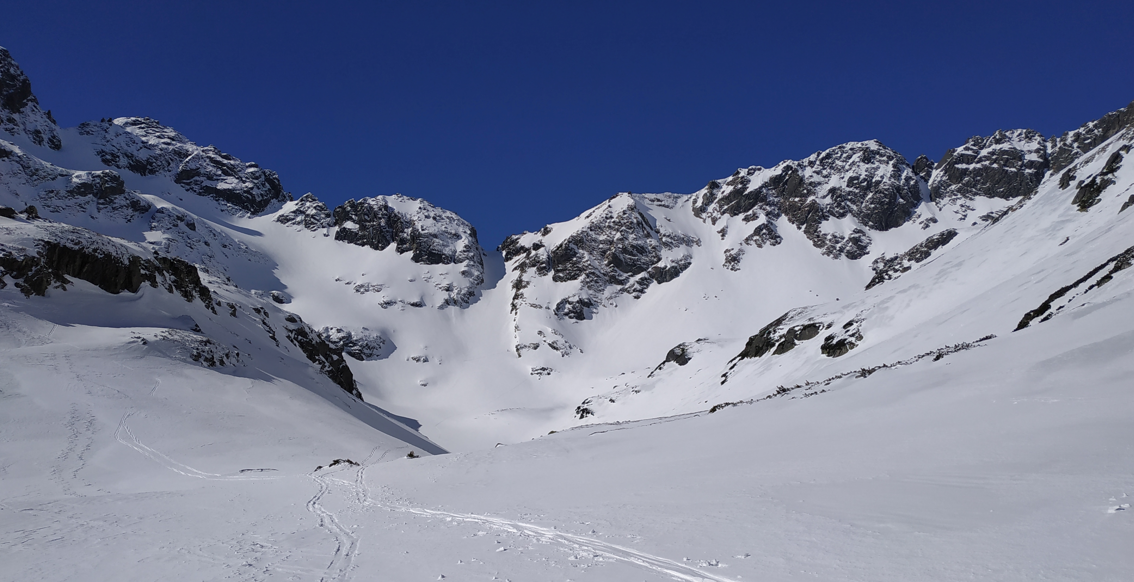 Grań główna nad Doliną za Mnichem